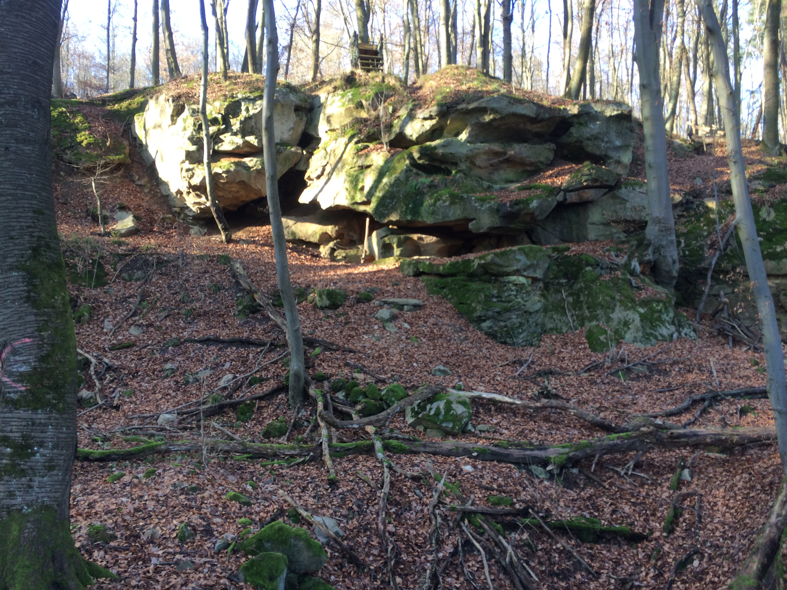 Paleolithische Abris am Fuß des Totenberg